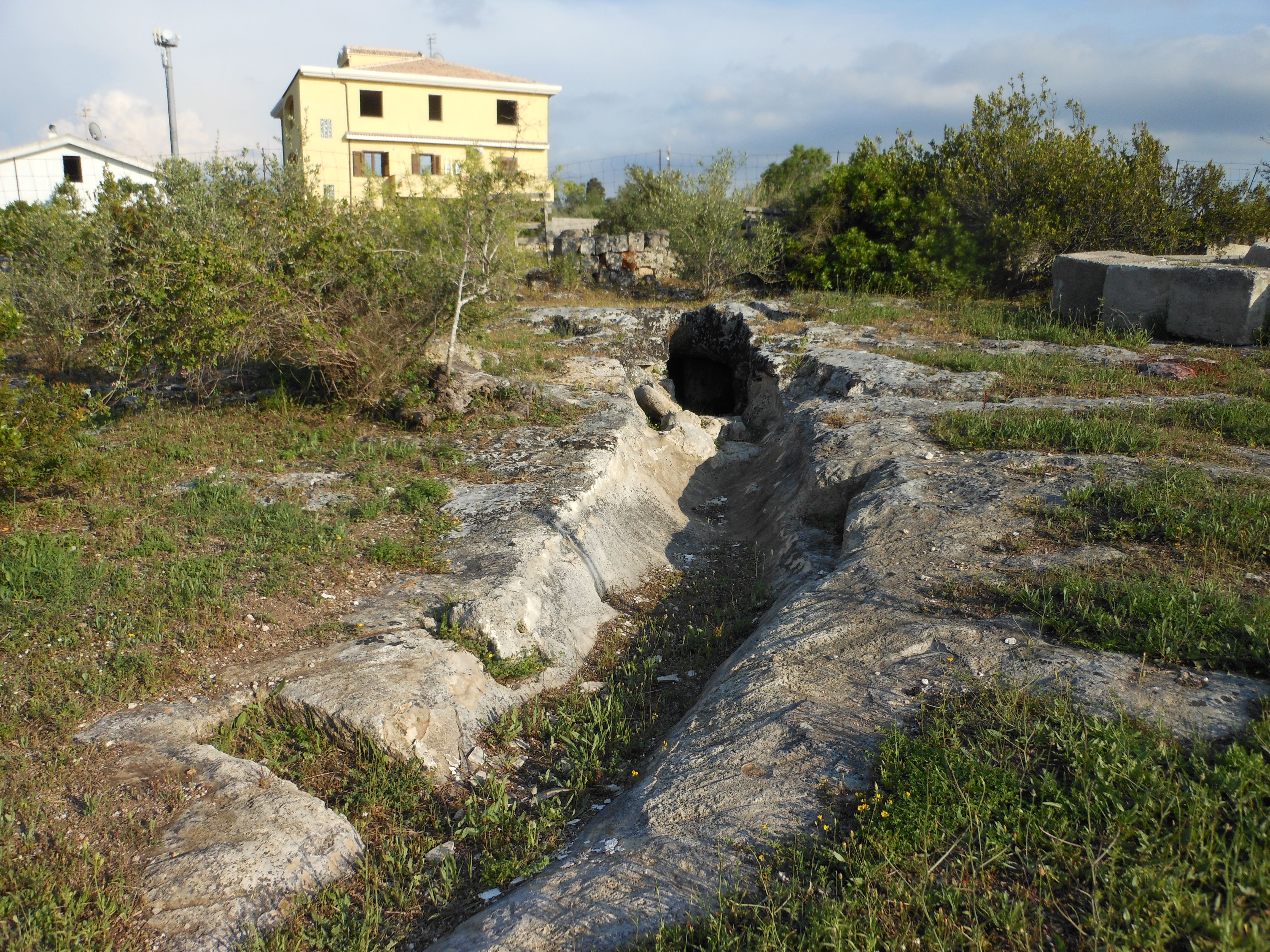 Sassari - Necropoli di Montalè